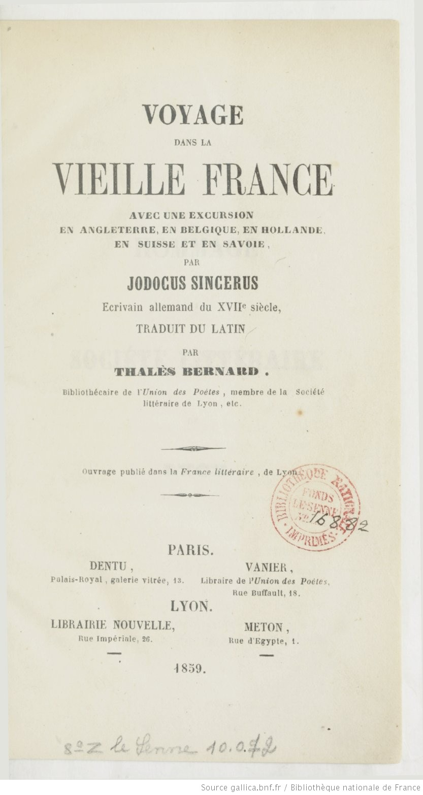 Couverture du livre Voyage dans la vieille France : avec une excursion en Angleterre, en Belgique, en Hollande, en Suisse et en Savoie / par Jodocus Sincerus,... ; traduit du latin par Thalès Bernard,... Auteur : Zinzerling, Justus (1590?-1620?). Éditeur : Dentu (Paris) Éditeur : Librairie nouvelle (Lyon) Date d'édition : 1859